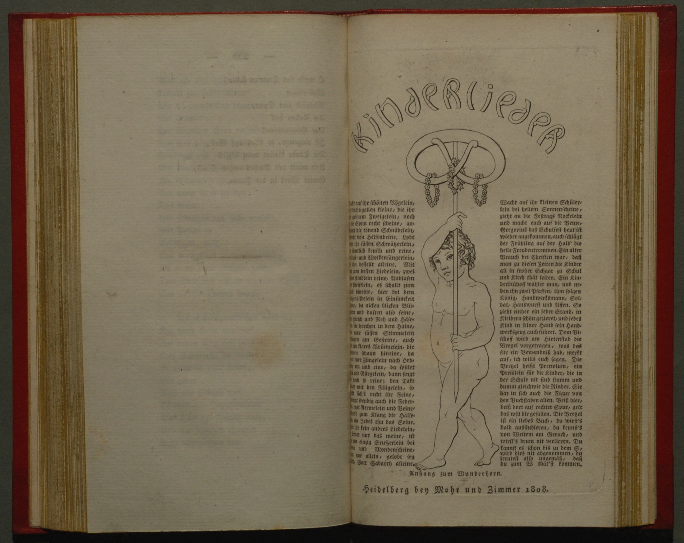 Des Knaben Wunderhorn Titelkupfer des Anhangs Kinderlieder in Band III